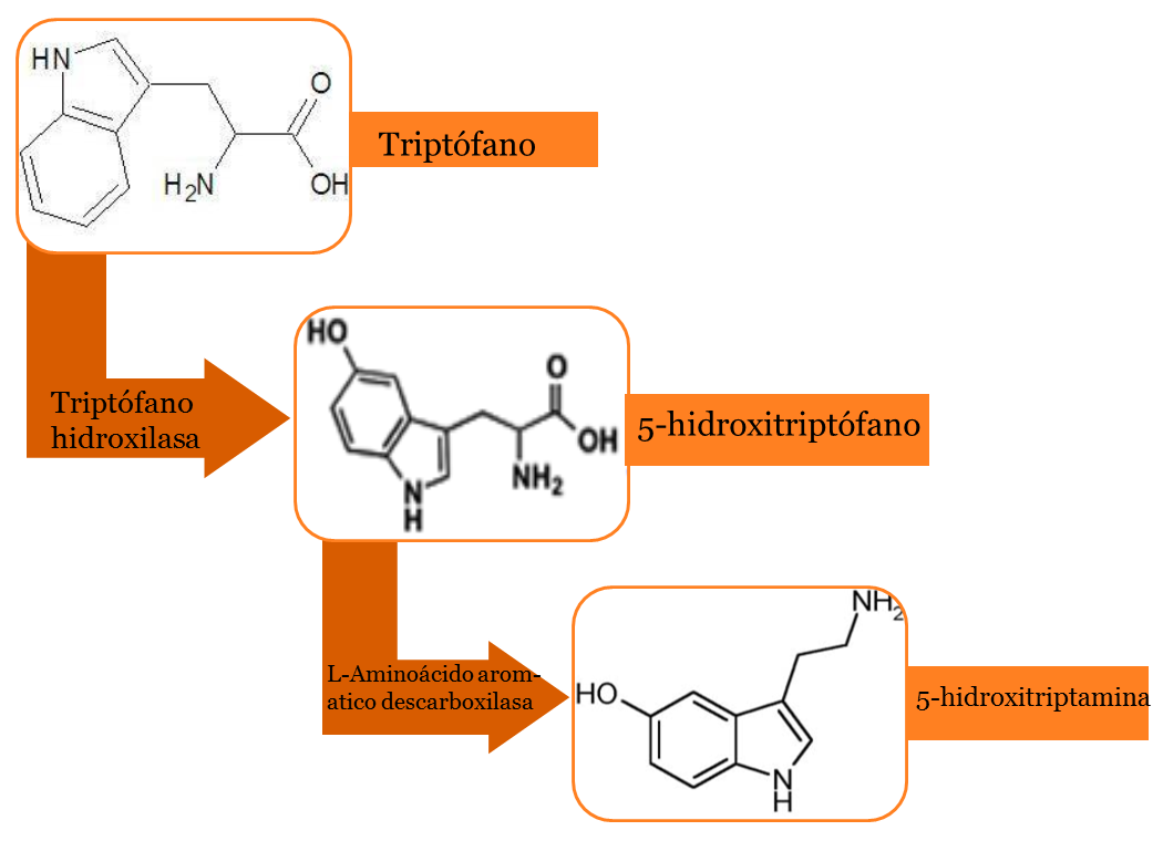 Síntesis química de la serotonina